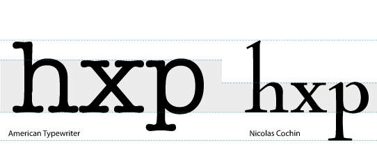 Gràfic que mostra dues tipografies del mateix cos amb una altura de la x diferent.